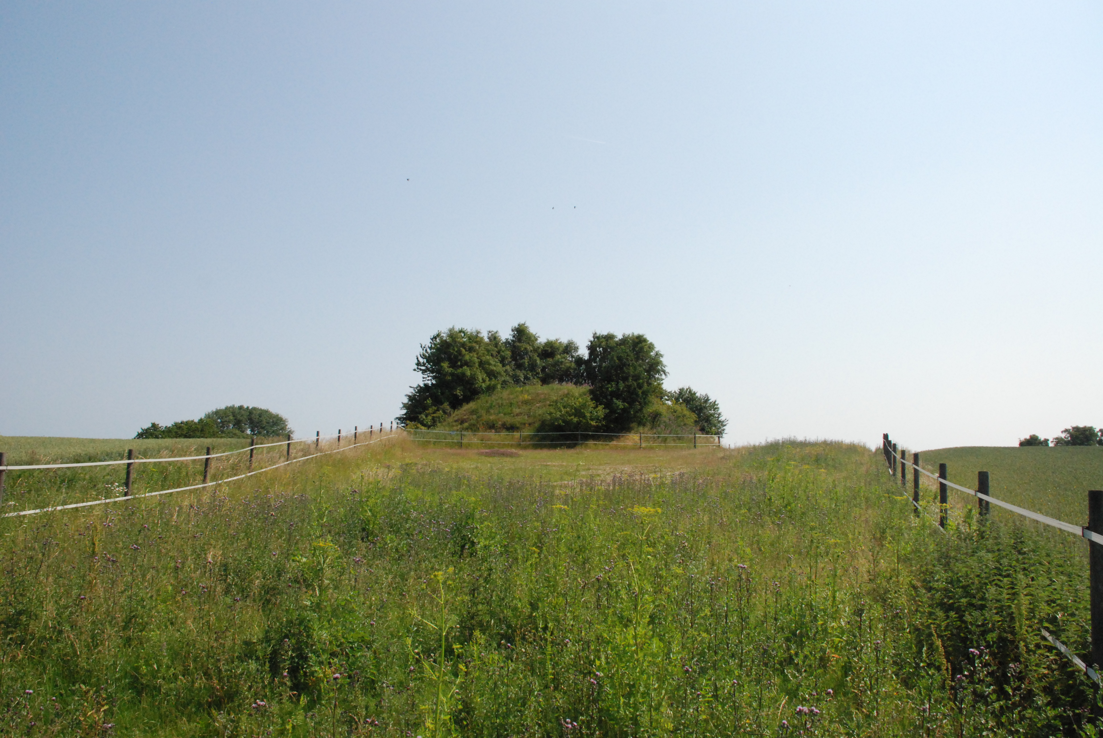 Gravhøjen Handskehøj, Ramløse Sogn, Holbo Herred, Frederiksborg Amt, Danmark, fotograferet fra vest.